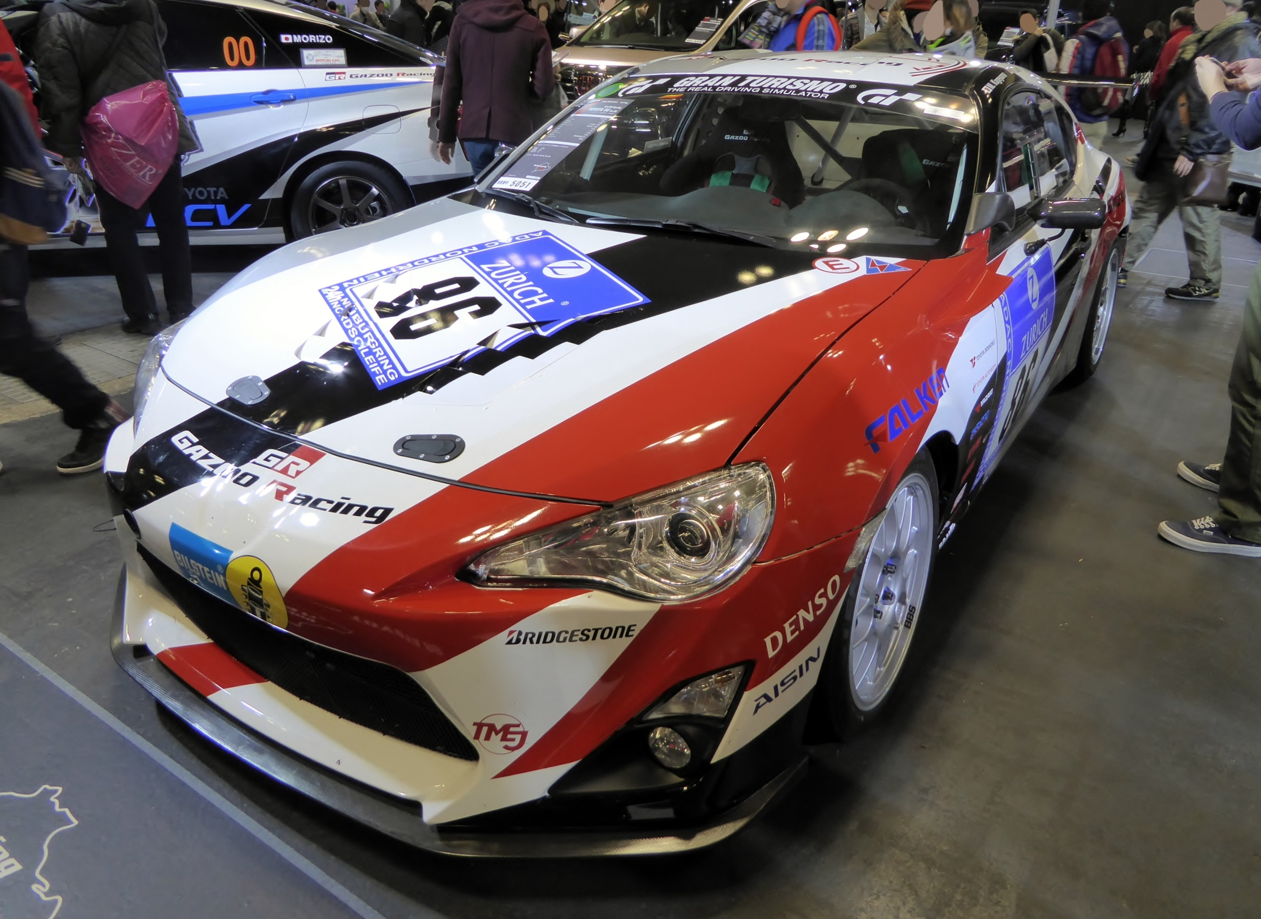 大阪オートメッセ2015においてGAZOO Racing TOYOTA 86を撮影。